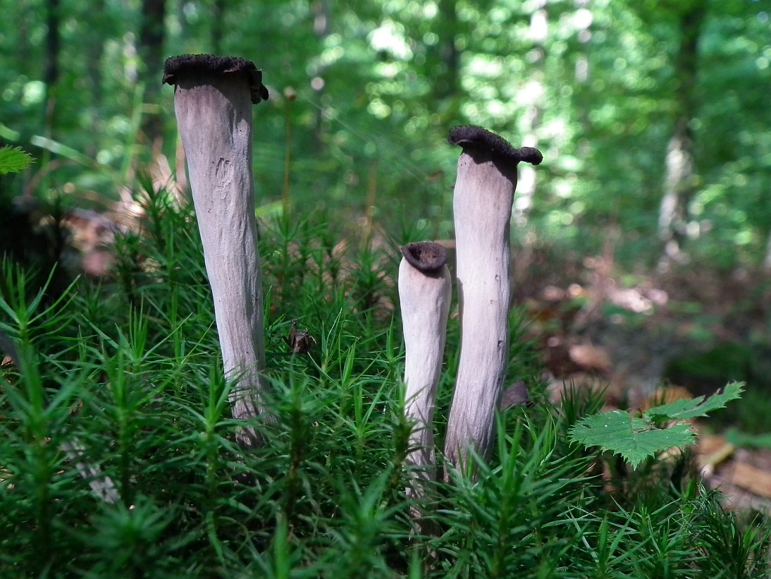 Lejkowiec dęty (Craterellus cornucopioides) Grzyb jadalny z pieprznikowatych.